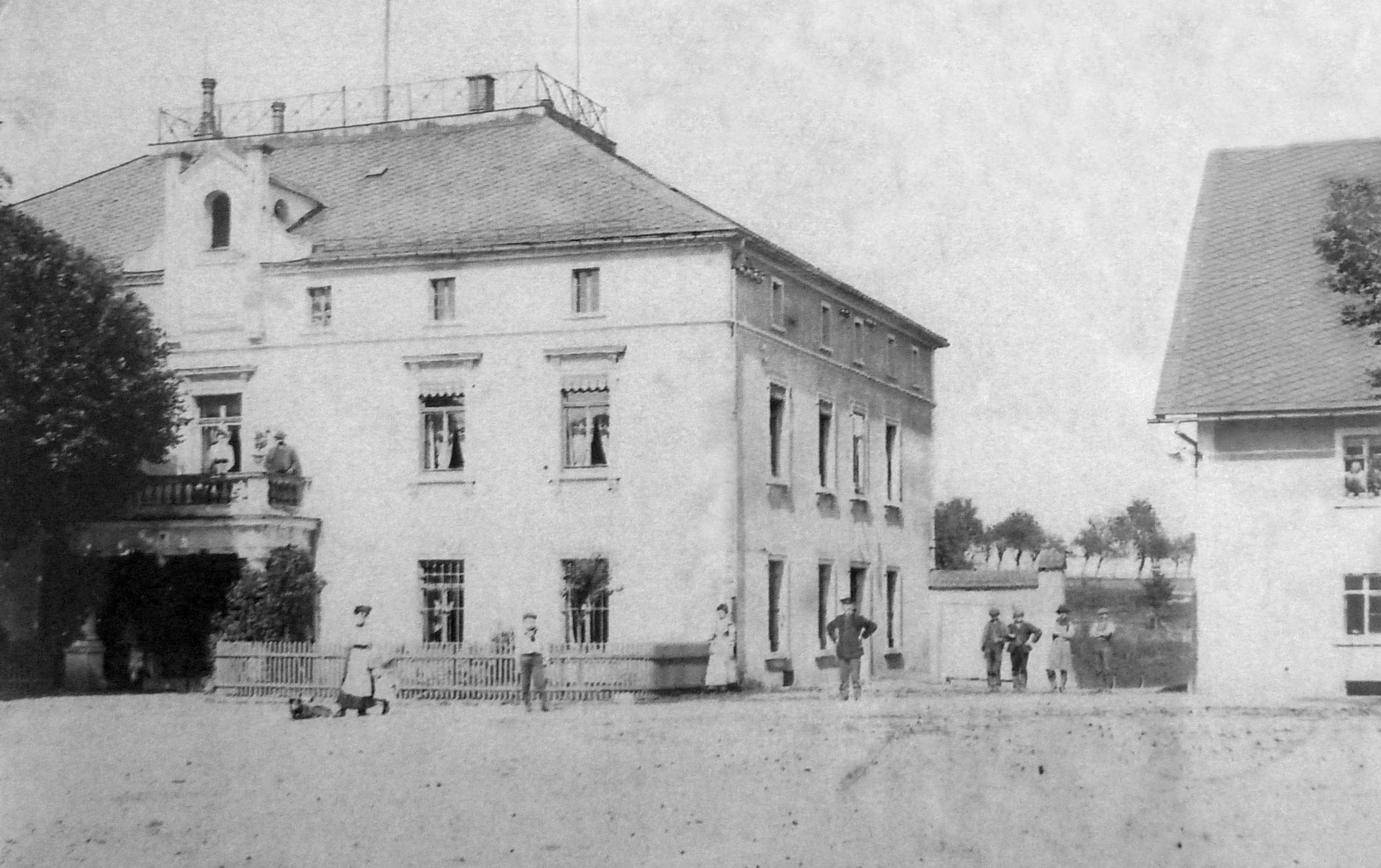 Eine Photographie des Ritterguts am Hofeteich in Niederoderwitz